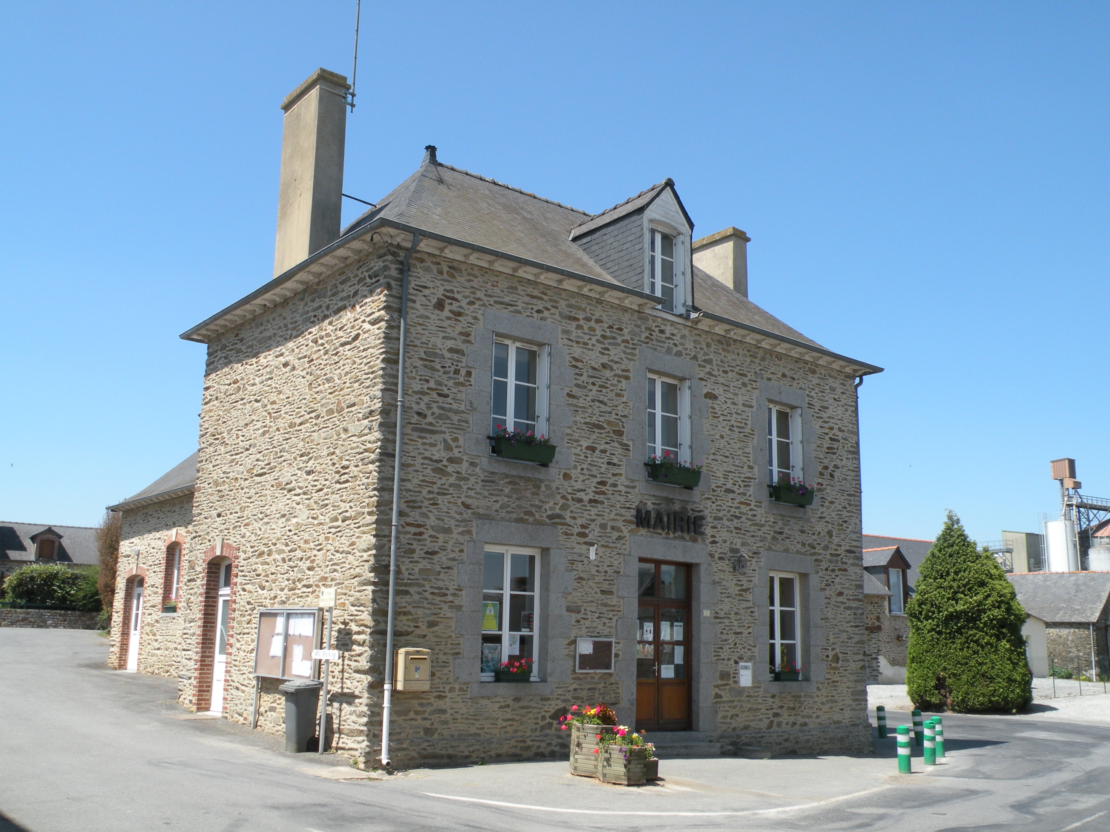 Mairie de Cornillé (Ille-et-Vilaine).